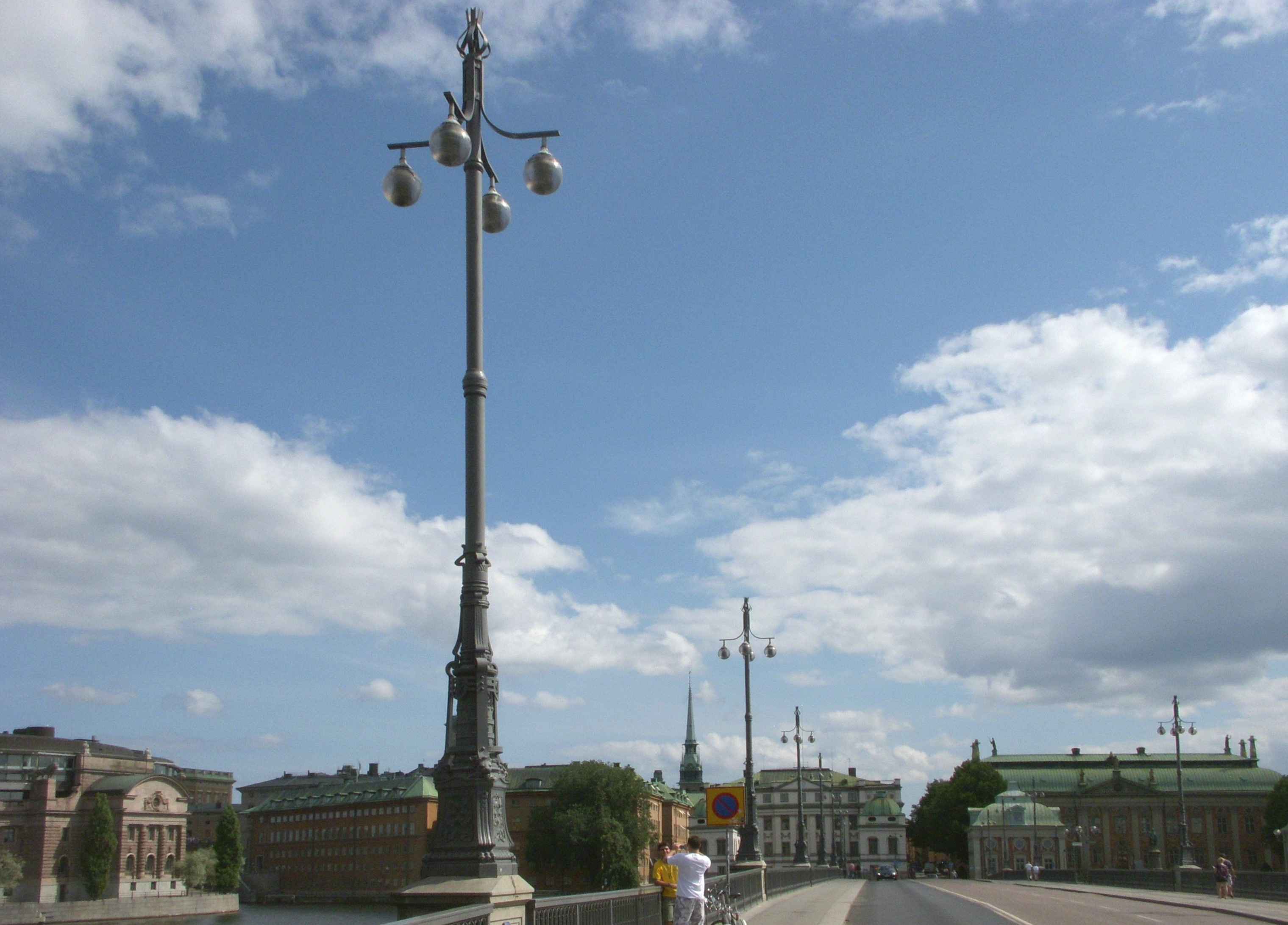 Vasabron i Stockholm, lyktstolpar